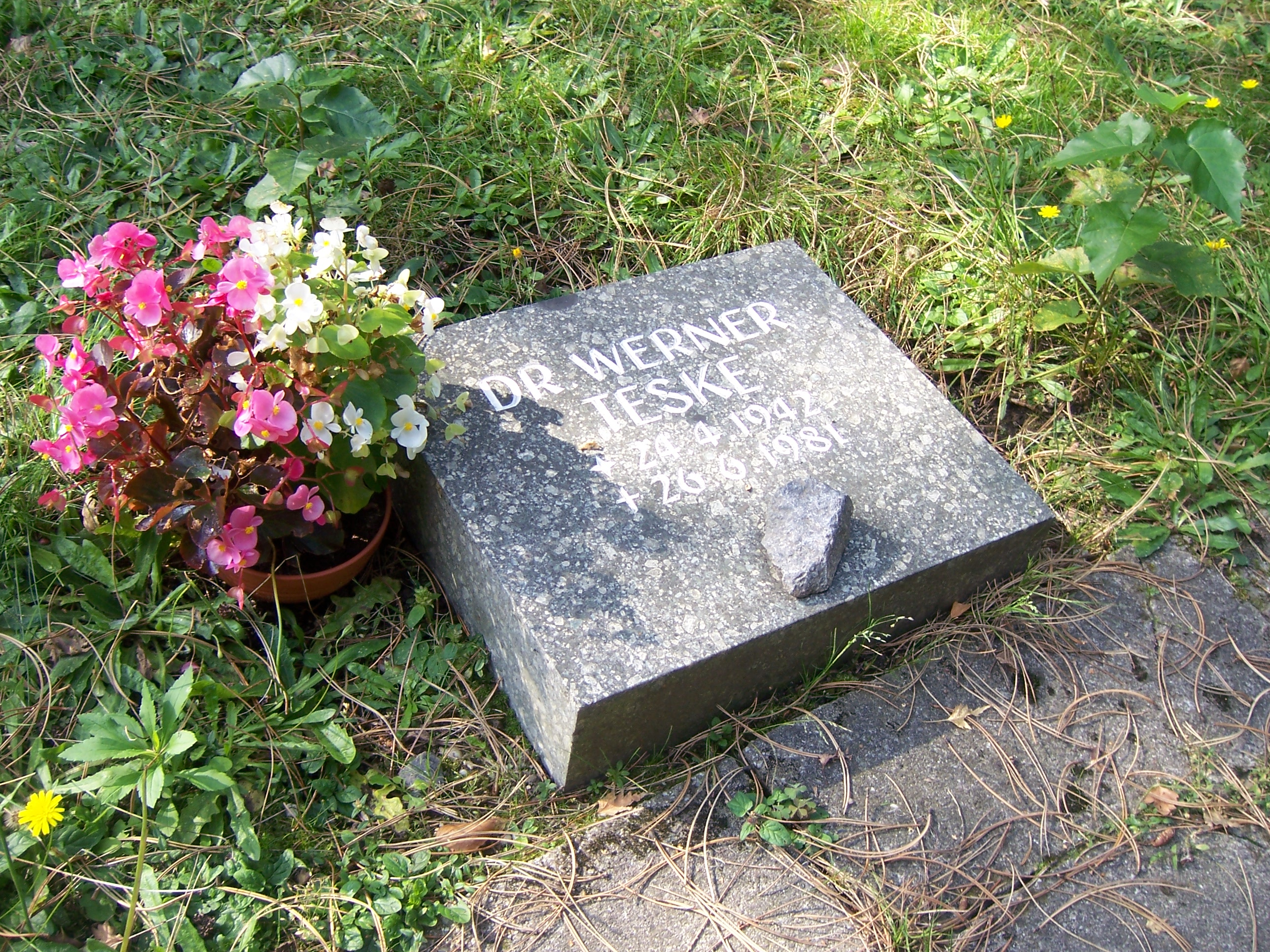 Grabplatte Werner Teske, Südfriedhof Leipzig am Urnenhain XXII.Abt.